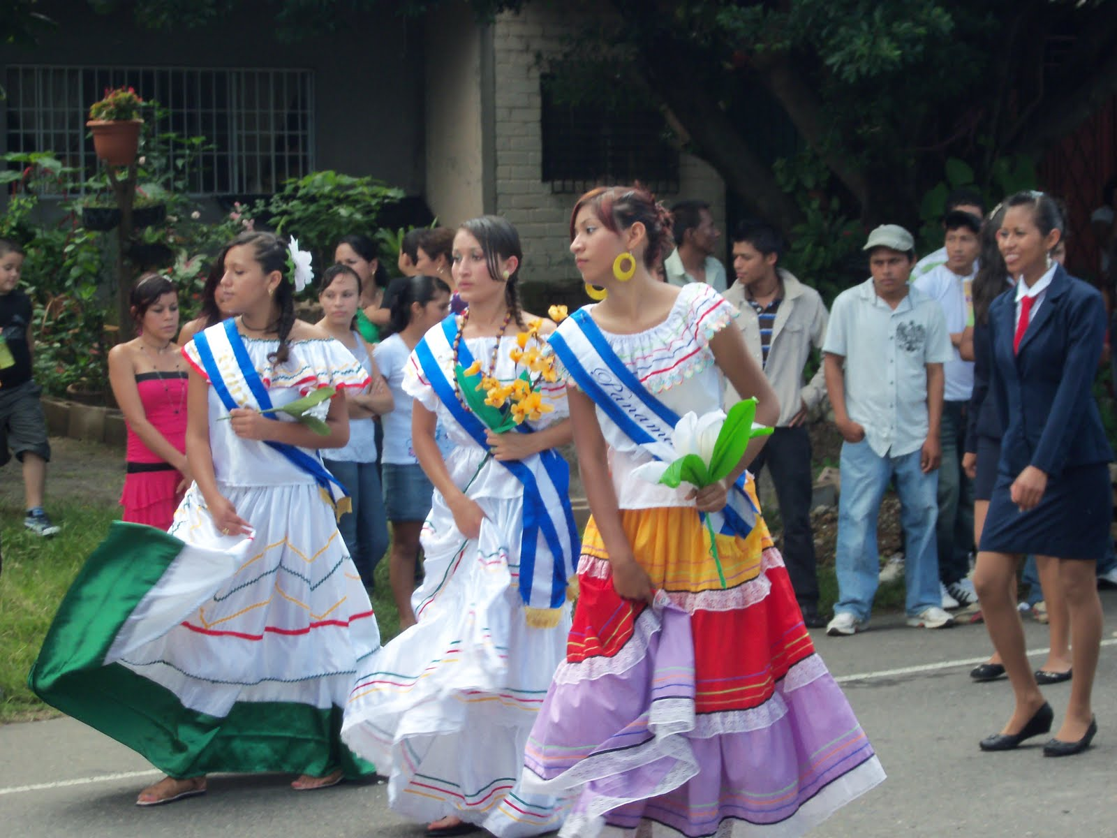 Celebracion de fiestas patrias en Las Chinamas